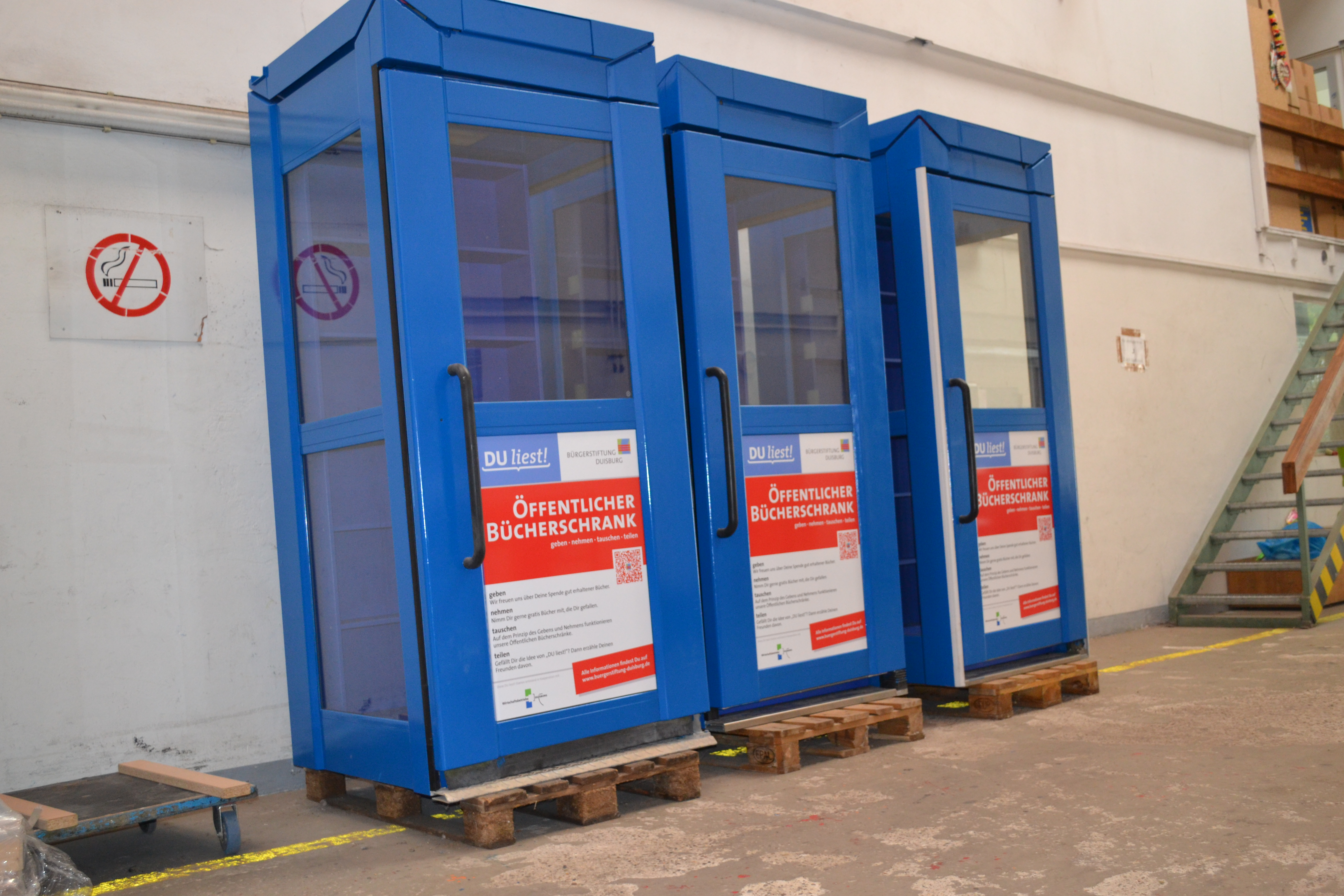 Die "Öffentlichen Bücherschränke" werden als Lesezellen im Stadtgebiet verteilt.